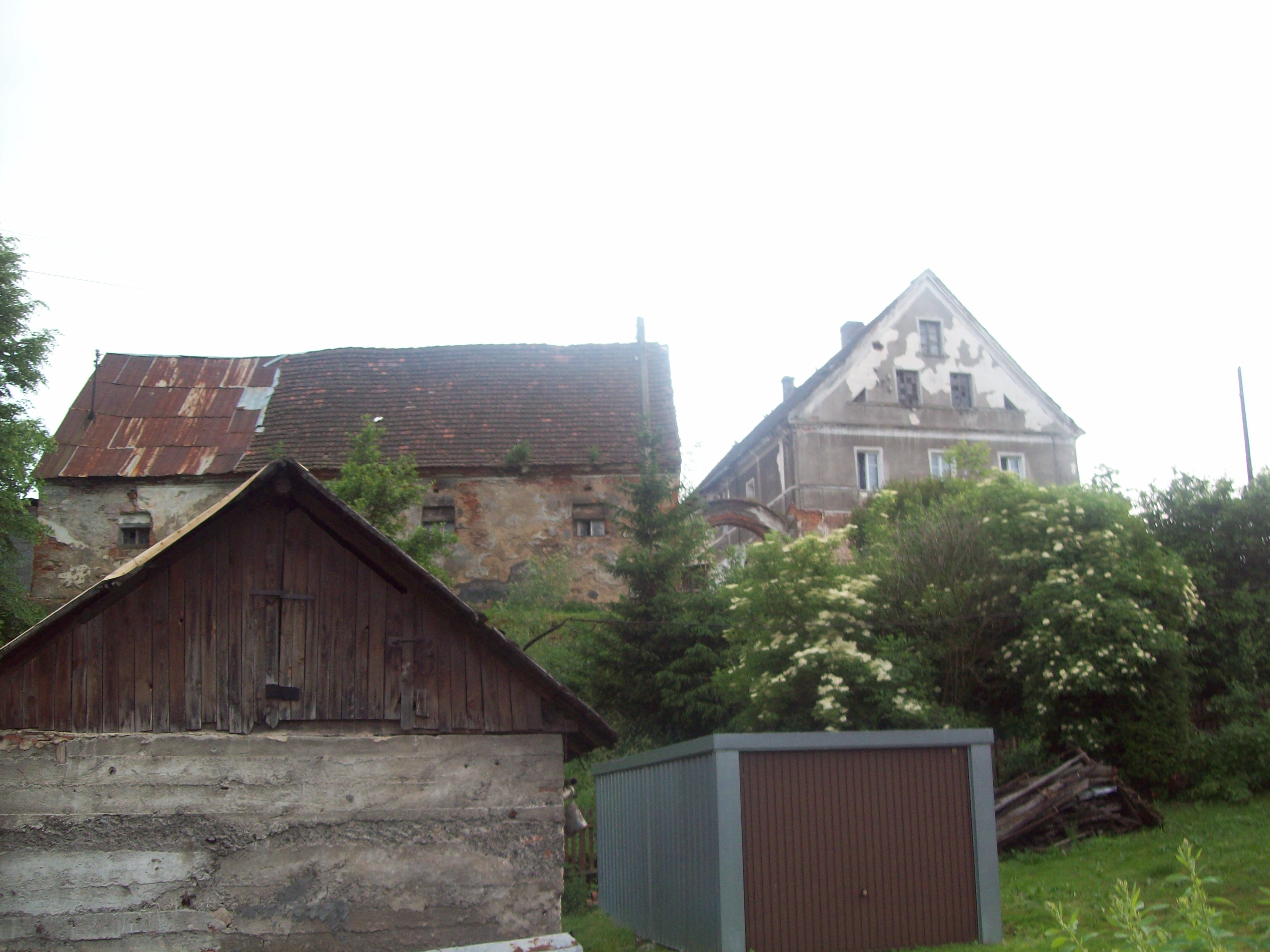 Folwark w Ołdrzychowicach Kłodzkich